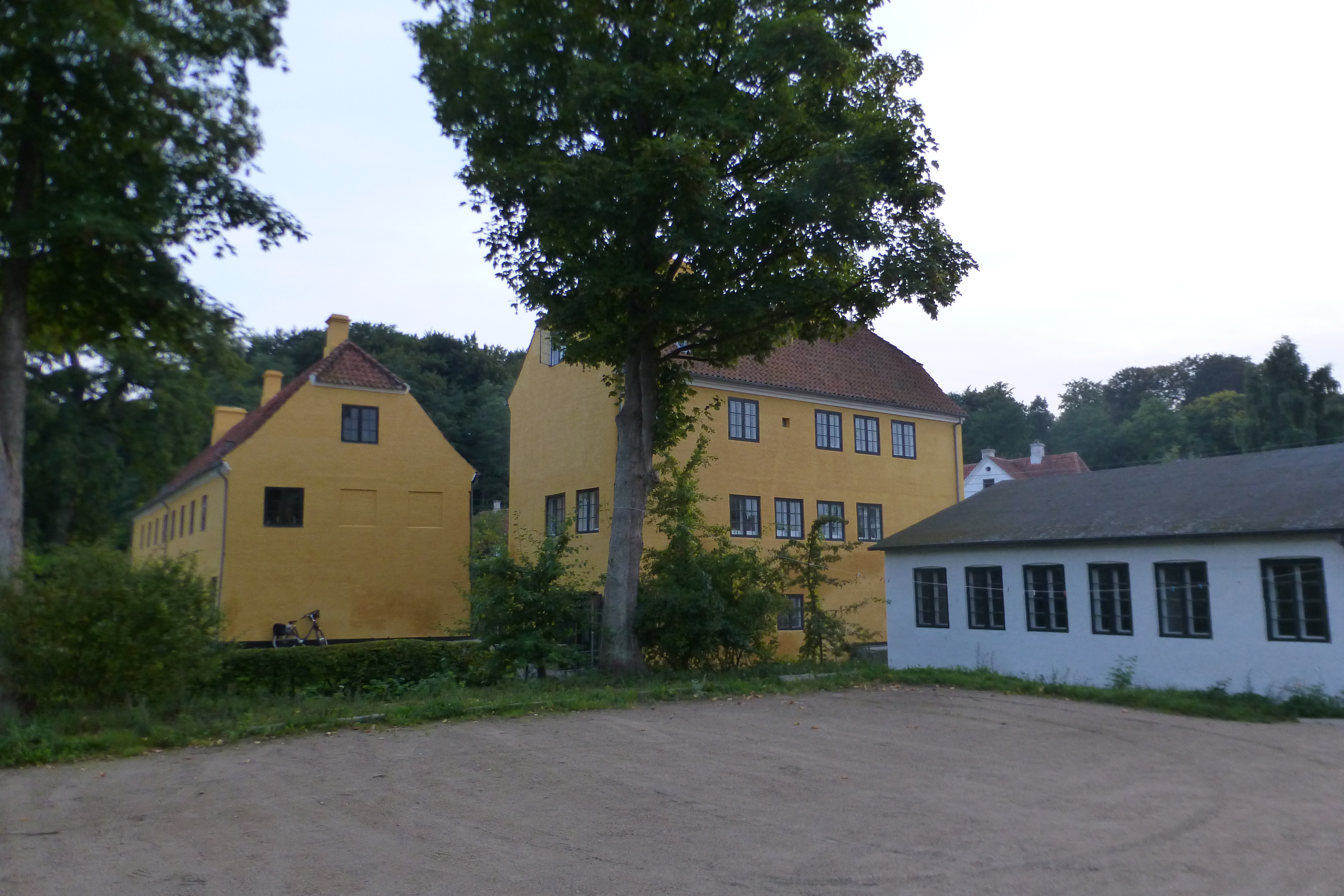 Raadvad fabrikker ved Mølleåen, gården